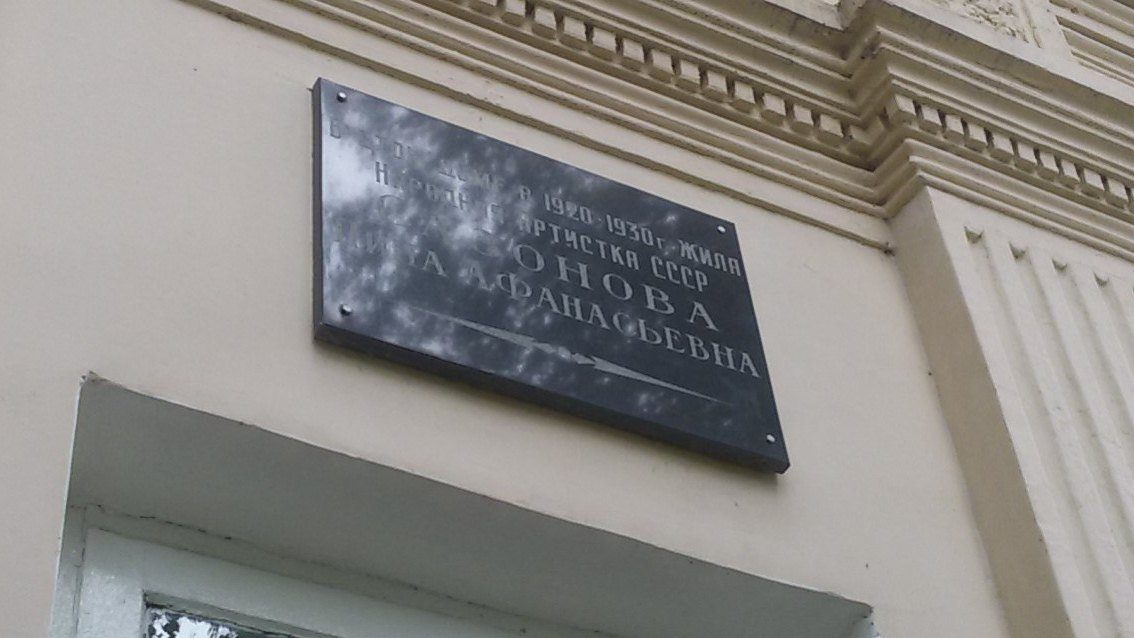 Мемориальная доска в память о Народной артистке СССР Нине Сазоновой на доме в Кимрах, где она проживала